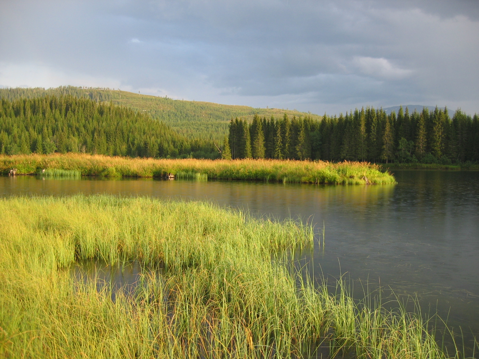 Namsen